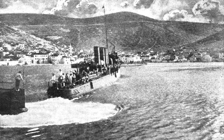 Avstro-Ogrske torpedovke se vračajo z zmagoslavnega napada na italijansko obalo